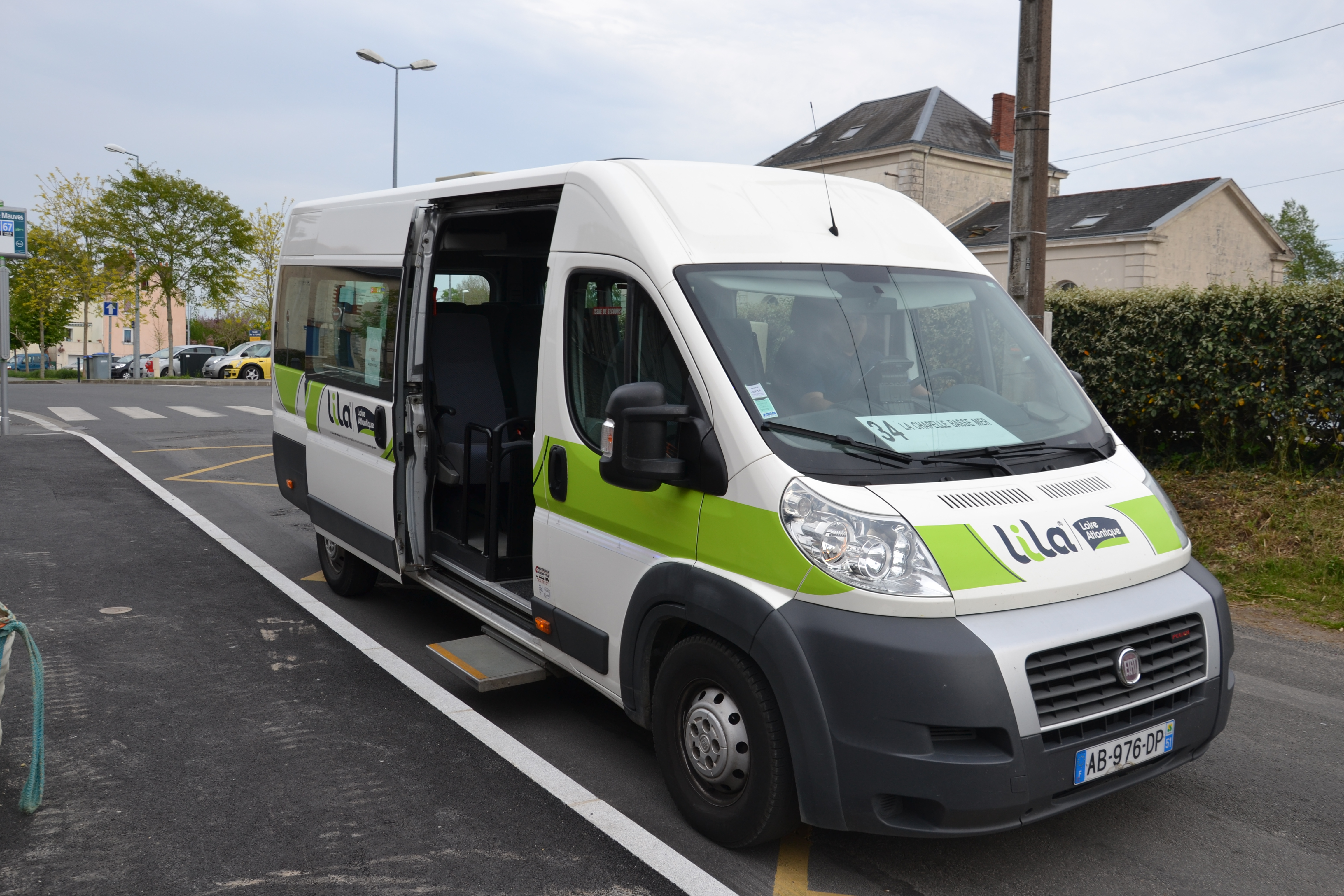 Véhicule navette utilisé sur la ligne 34 entre Mauves sur Loire et La Chapelle Basse Mer (Divate sur Loire) à son arrêt gare de Mauves